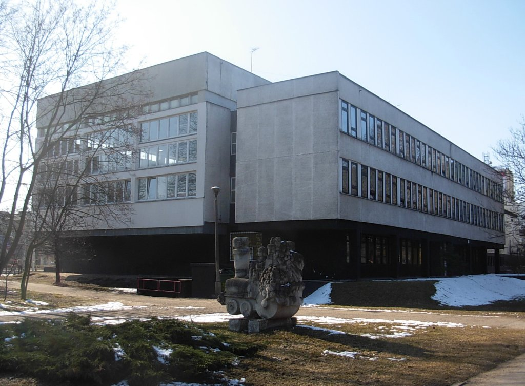 Pałac Młodzieży w Bydgoszczy